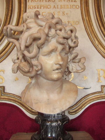 Gian Lorenzo Bernini: Medusa